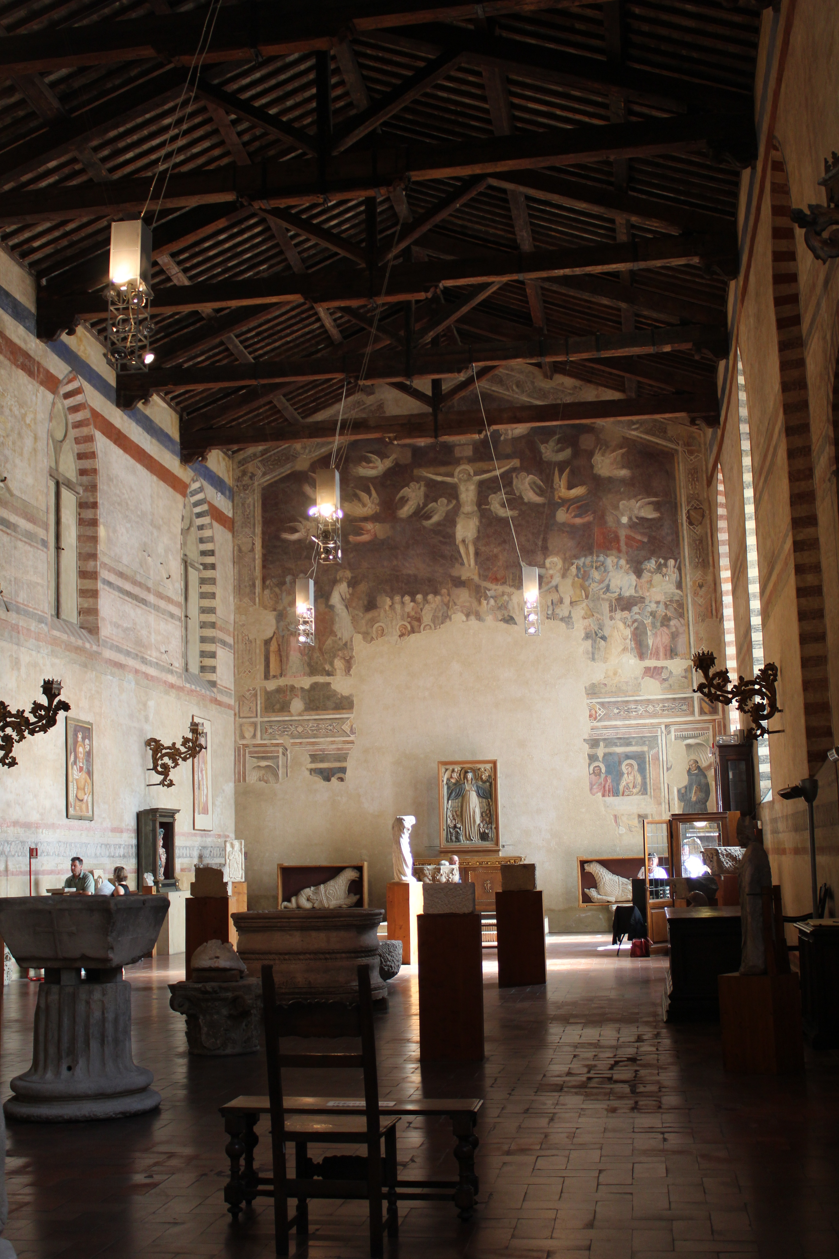 Cenacolo di Santo Spirito Florence